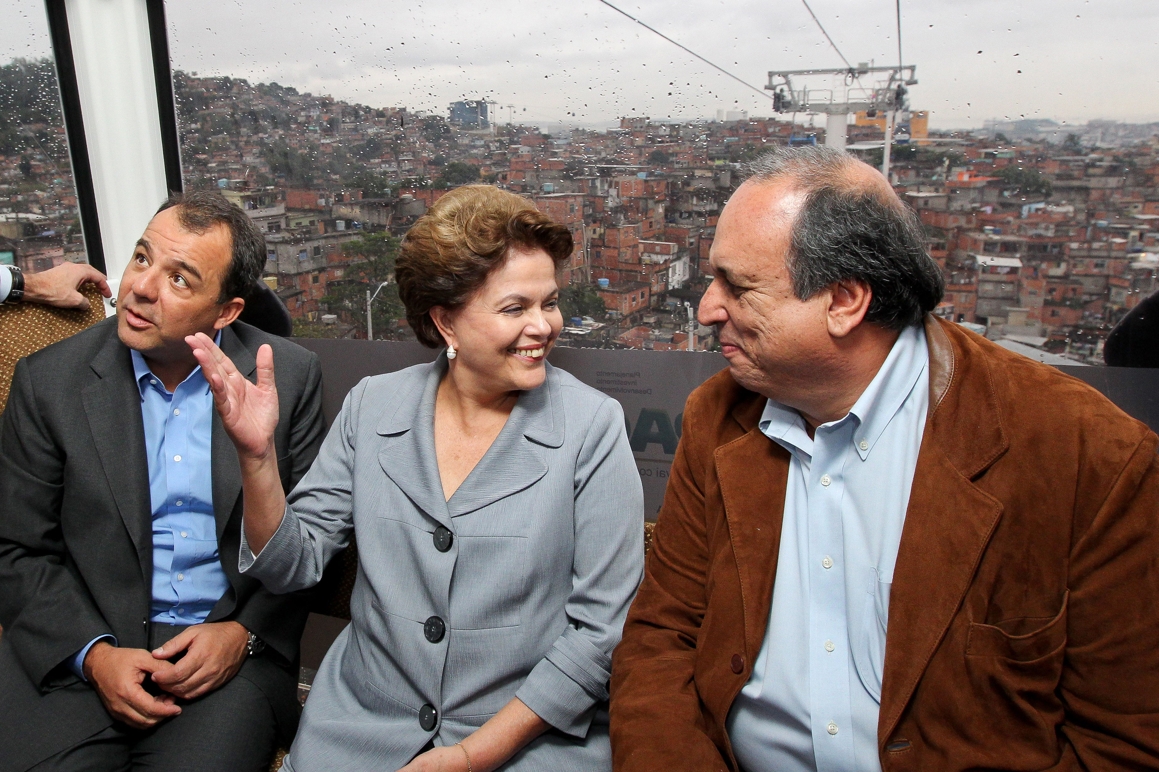 Presidenta Dilma Rousseff, o governador Sérgio Cabral e o vice-governador Luiz Fernando Pezão durante visita à estação de Teleférico do Morro do Alemão (Rio de Janeiro, RJ, 07/07/2011) Foto: Roberto Stuckert Filho/PR